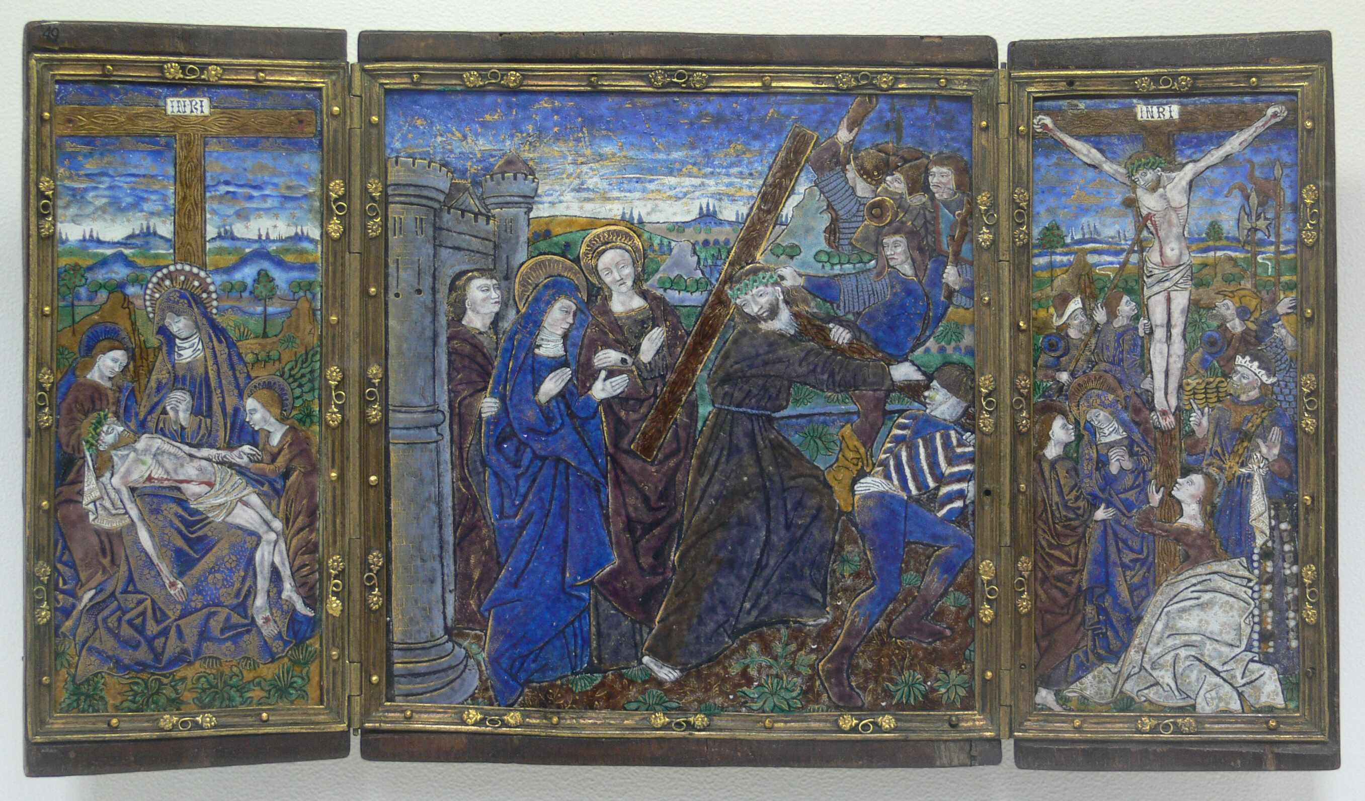 Liebfrauenkirche, Ravensburg Email-Triptychon der Monvaerni-Werkstatt, Limoges, ca. 1460-1500, 27 x 47,5 cm Spende eines anonymen Sammlers an die Kirchengemeinde Liebfrauen